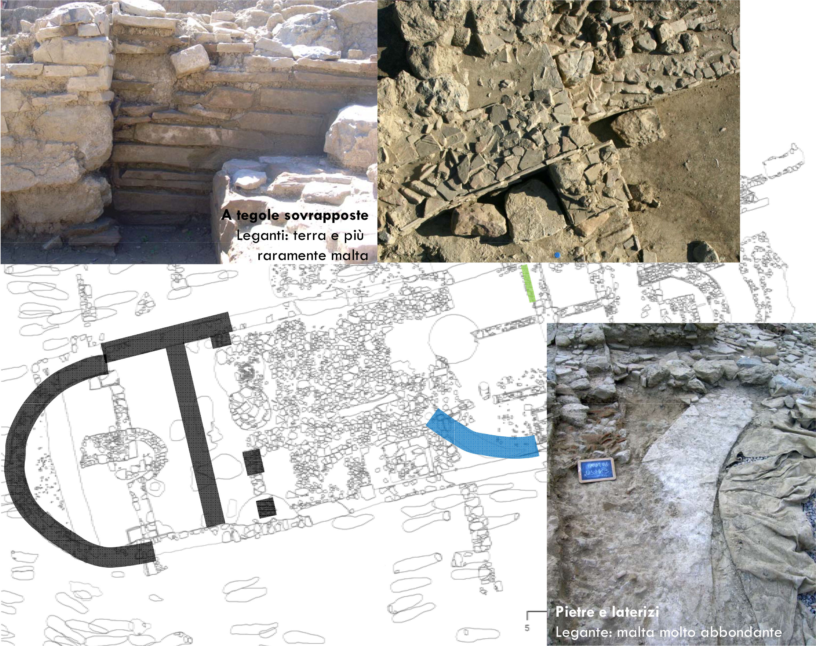 fase I